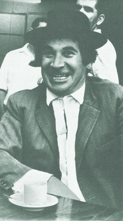 una foto sacada durante Polémica en el bar en la década del 70